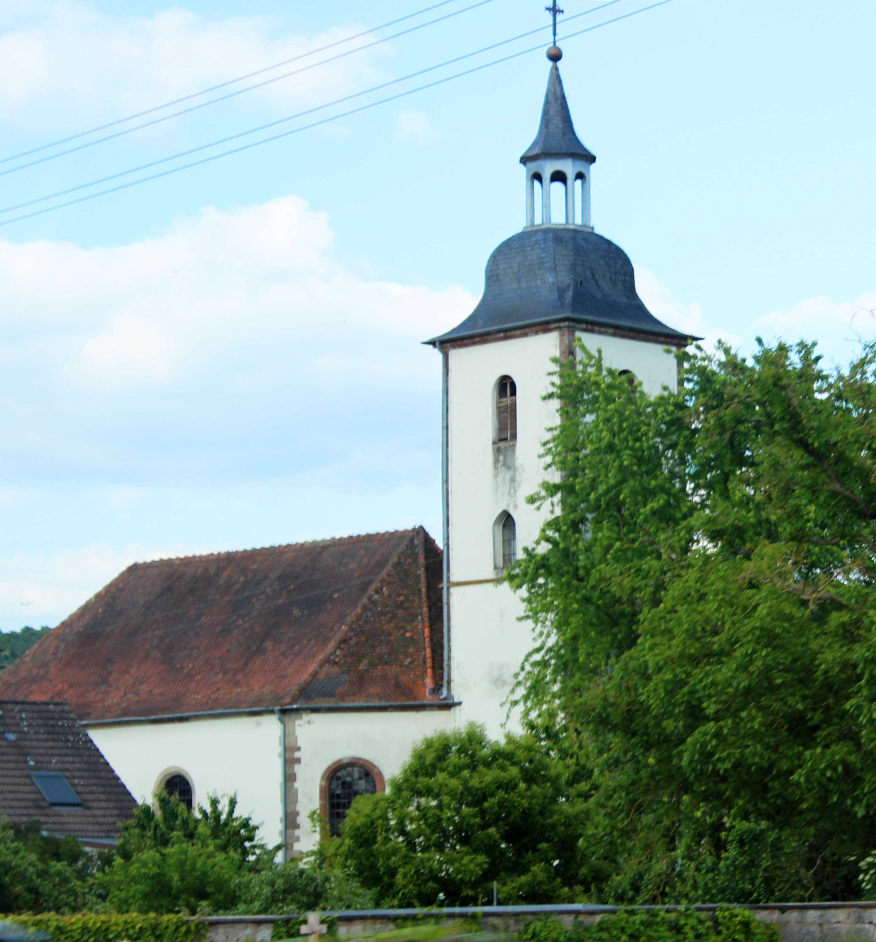 Alte Kirche, Bliesmengen-Bolchen, Gemeinde Mandelbachtal, Saarpfalz-Kreis, Saarland